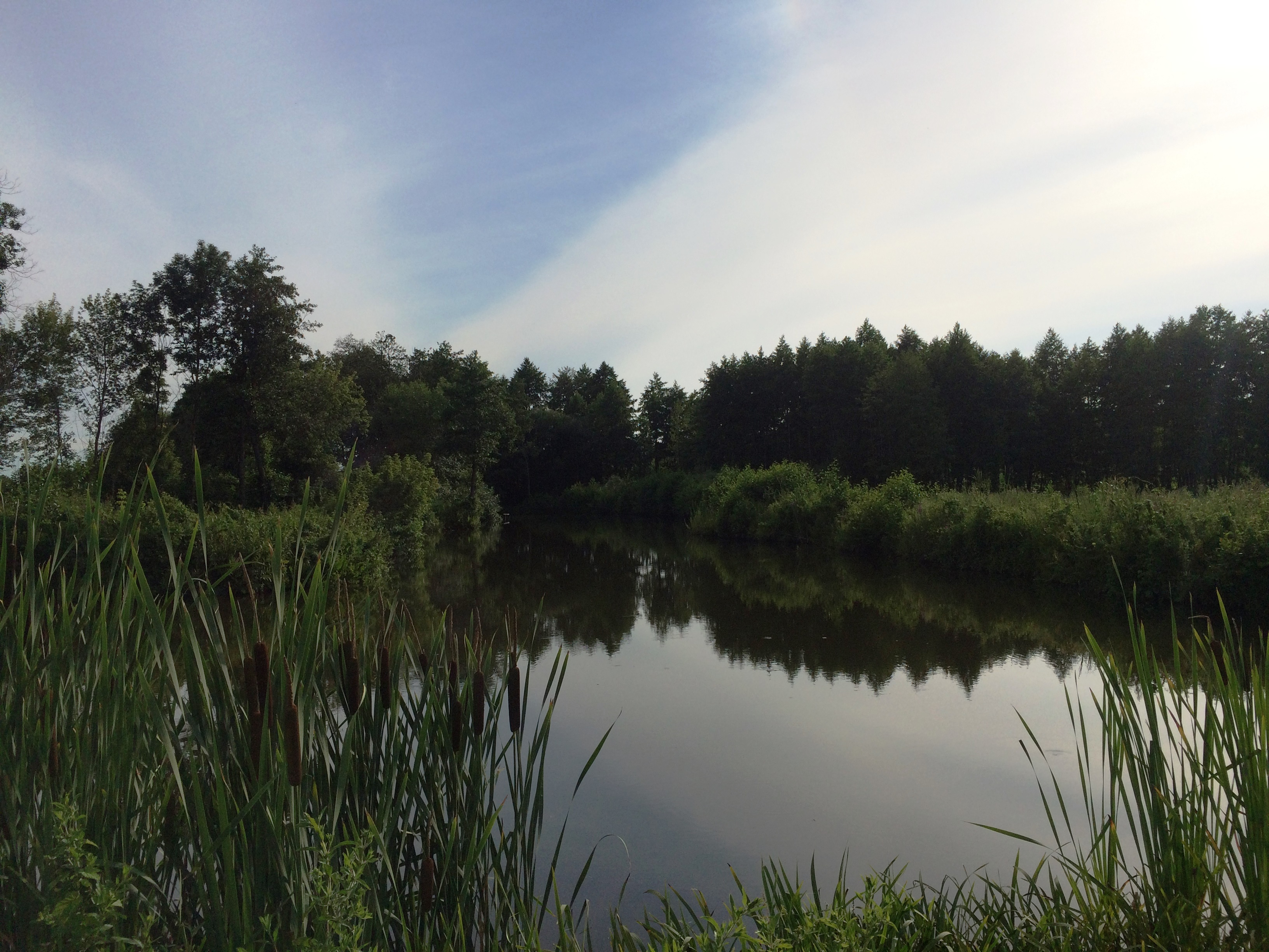 Штучний ставок на р.Коденка поблизу с.Сьомаки, 2018 50°00'39.8"N 28°38'34.2"E